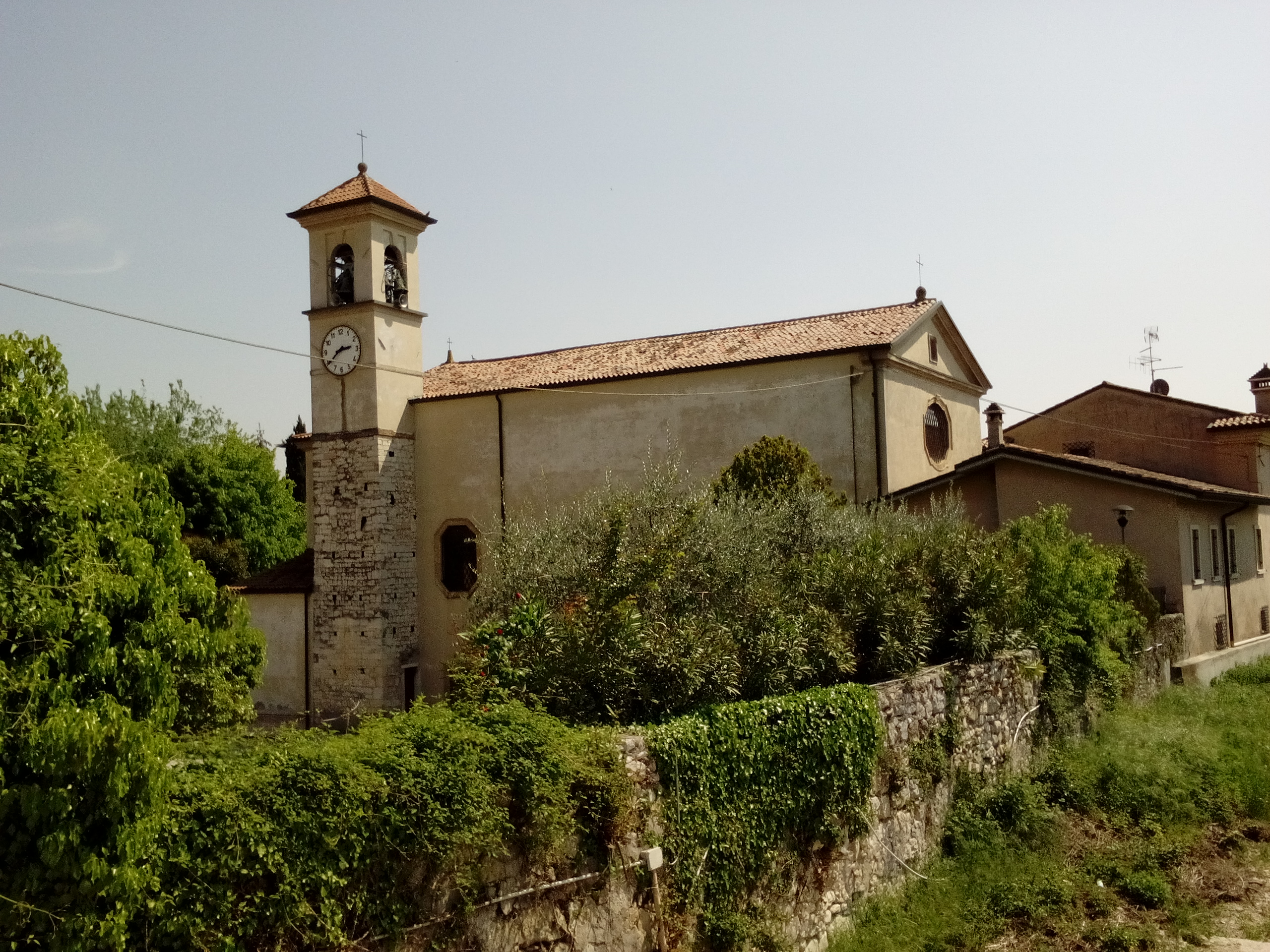 Chiesa di Santa Maria in Progno, a Santa Maria, frazione di Negrar, provincia di Verona.